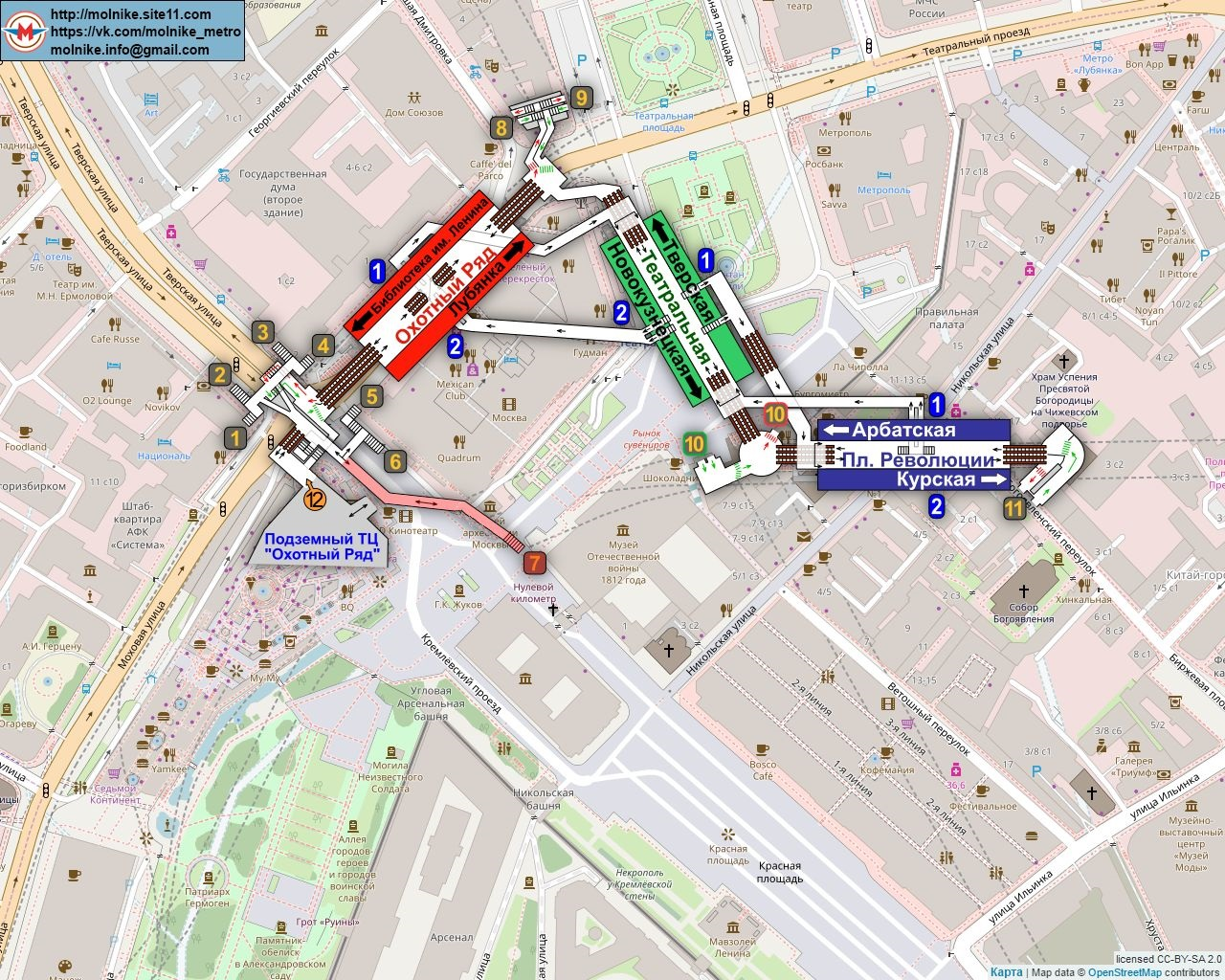 Схема станций метро «Театральная», «Площадь Революции» и «Охотный Ряд» на карте Москвы